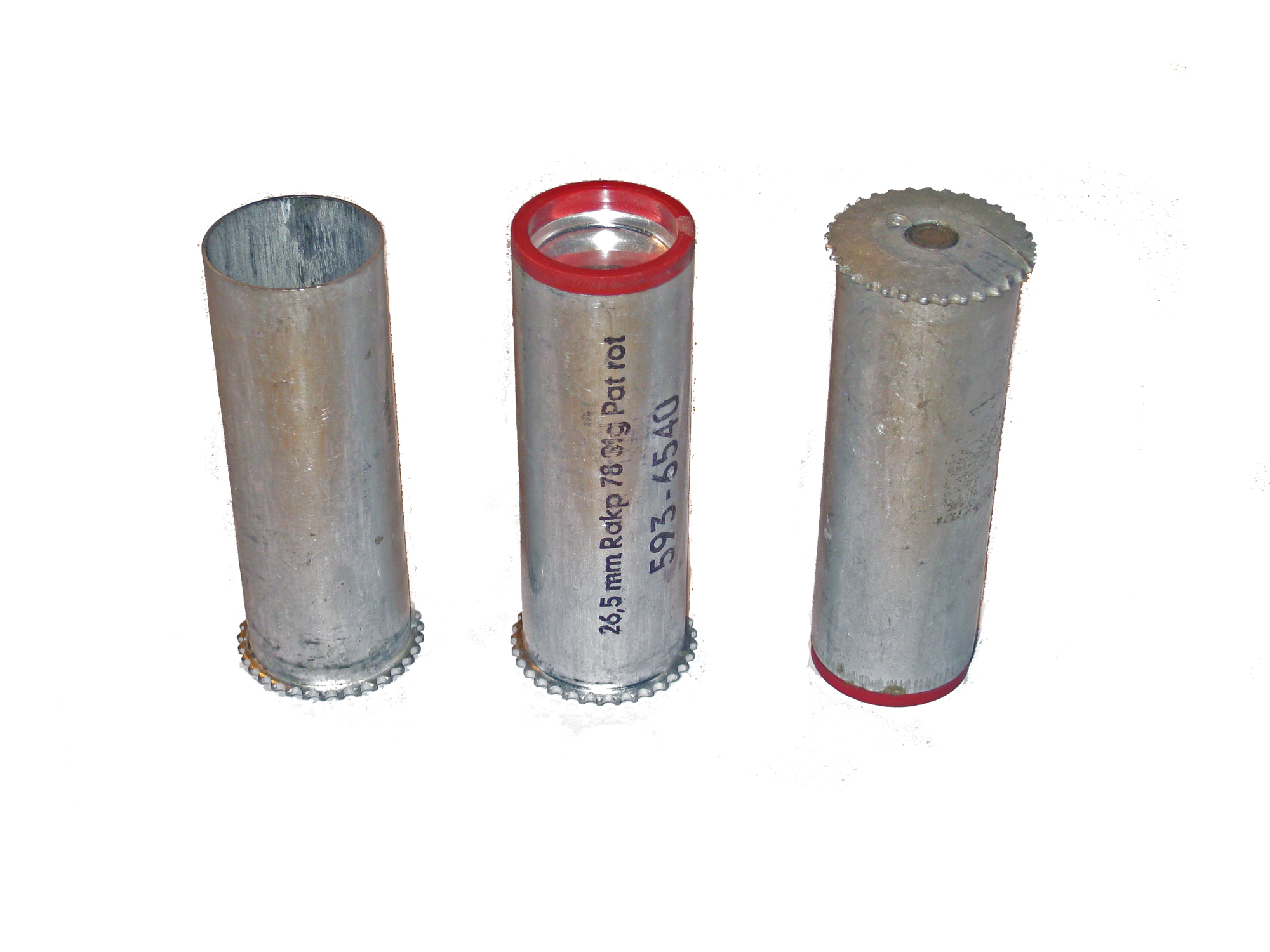 26,5 mm Rakp 78 Sig Pat rot, ALN 593-6540, v.l.n.r.: leere Hülse, von vorne, von hinten